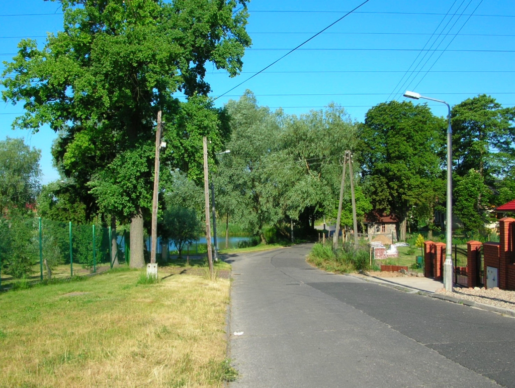 Ulica Lisia na os. Prądy w Bydgoszczy